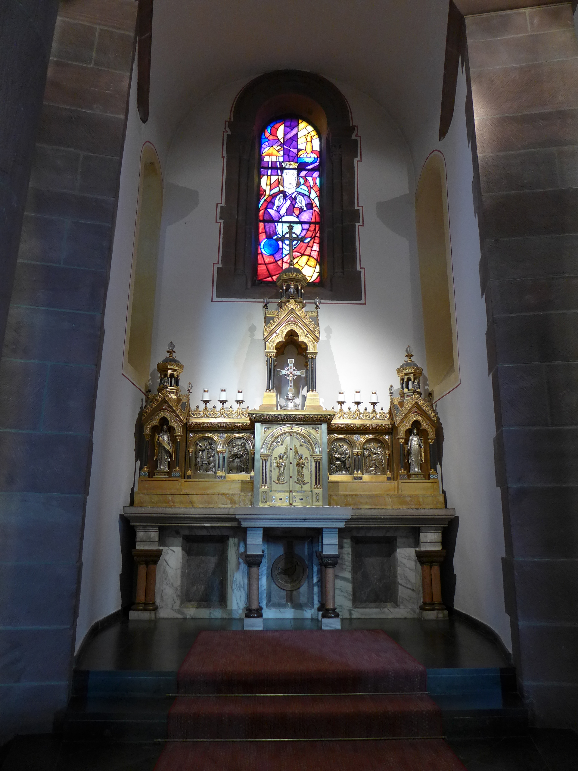 Saardom, Sakramentskapelle mit neuromanischem Hochaltar von Bernhard Witte, Aachen